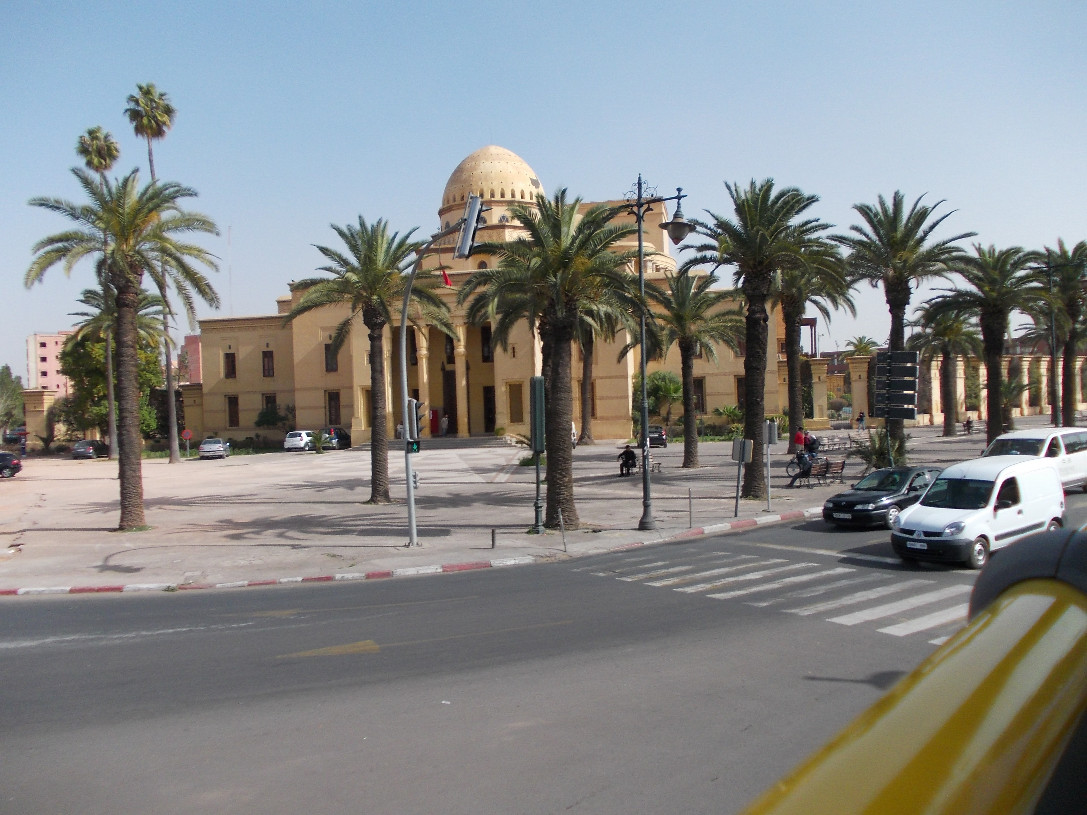 Por las calles de Marrakech